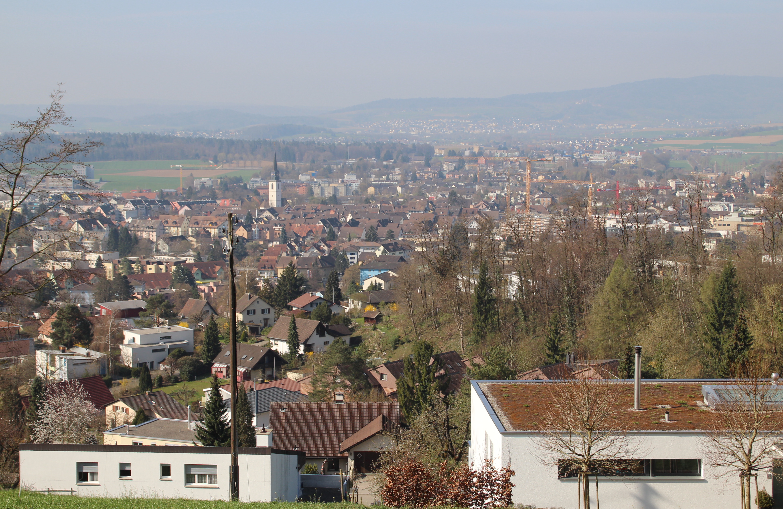 Bülach von Osten